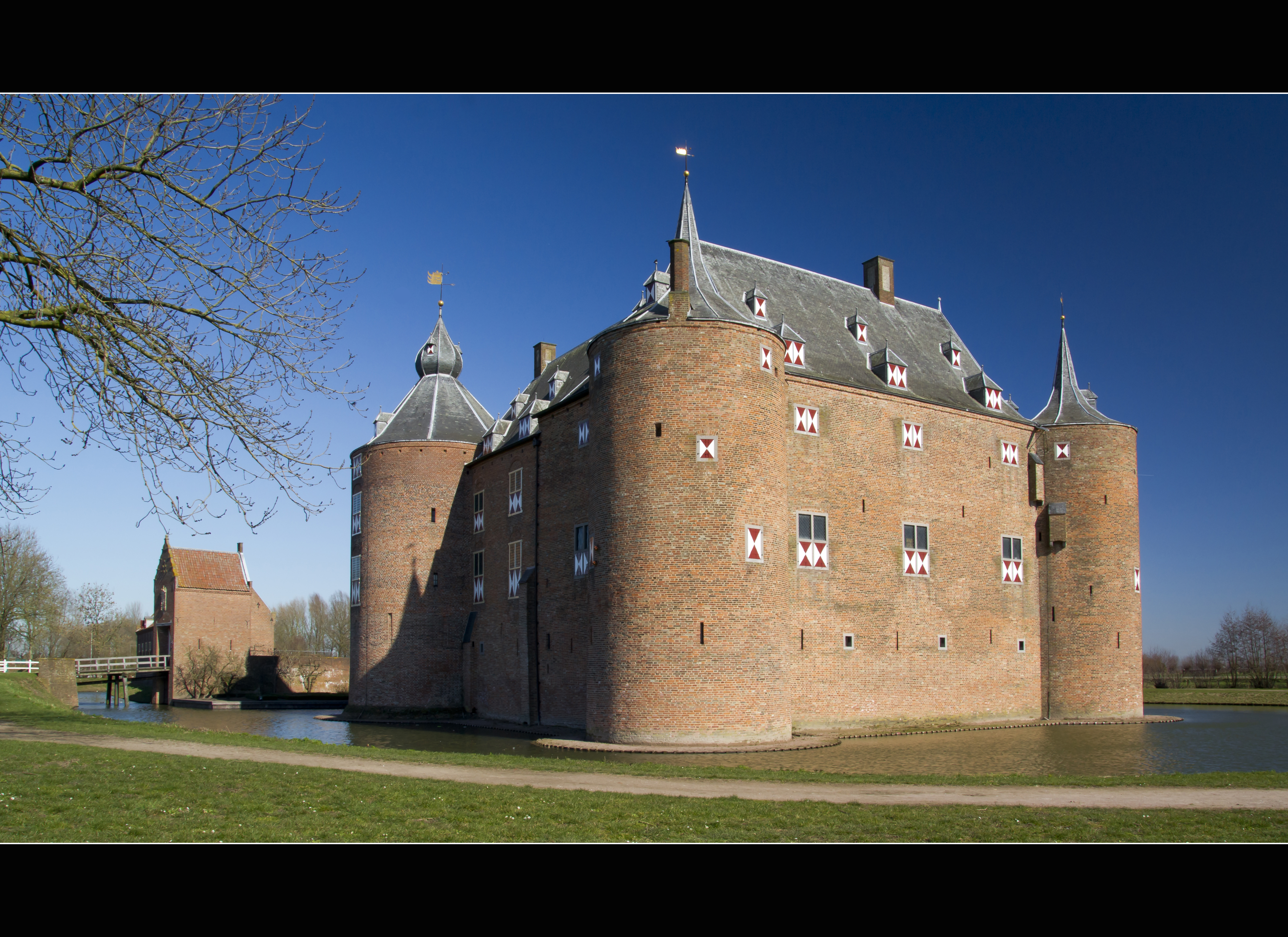 Ammerzoden - the Netherlands